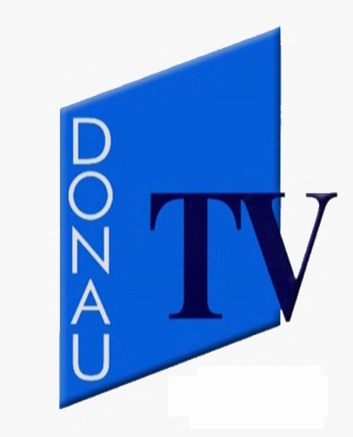 früheres Logo des Senders Donau TV